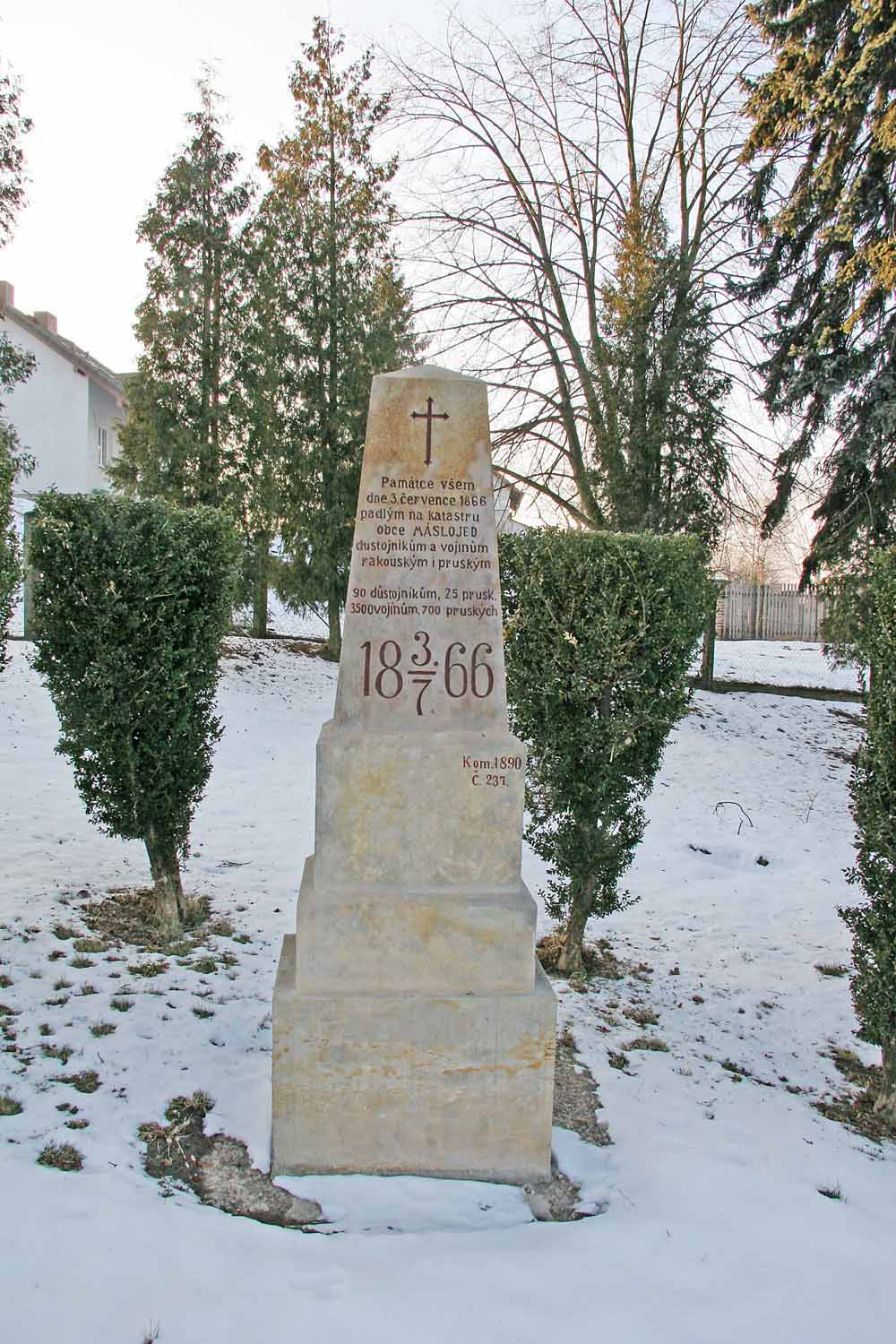 Pomník z Prusko-rakouské války roku 1866